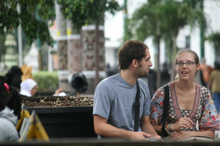 Di nol kilometer Yogyakarta